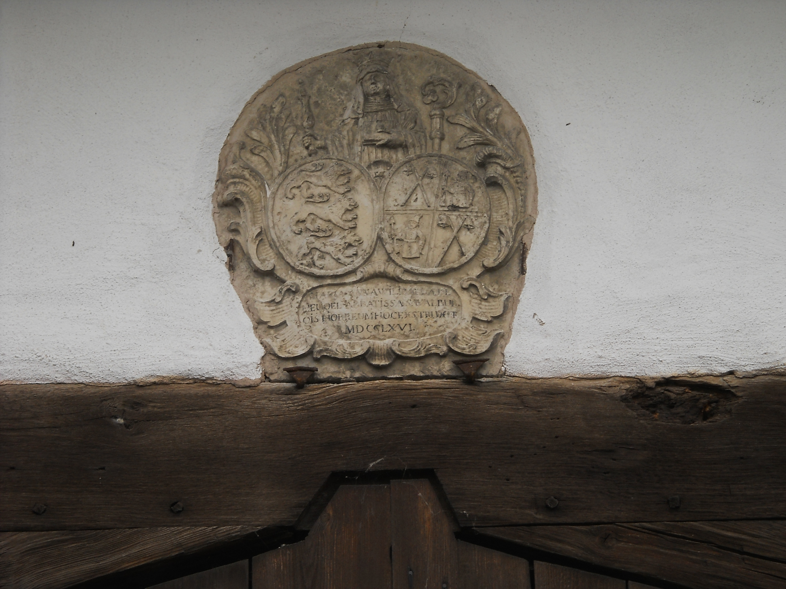 Dietfurt in Mittelfranken, Ortsteil von Treuchtlingen, Wappen des Eichstätter Klosters St. Walburg an der ehemaligen Zehentscheune